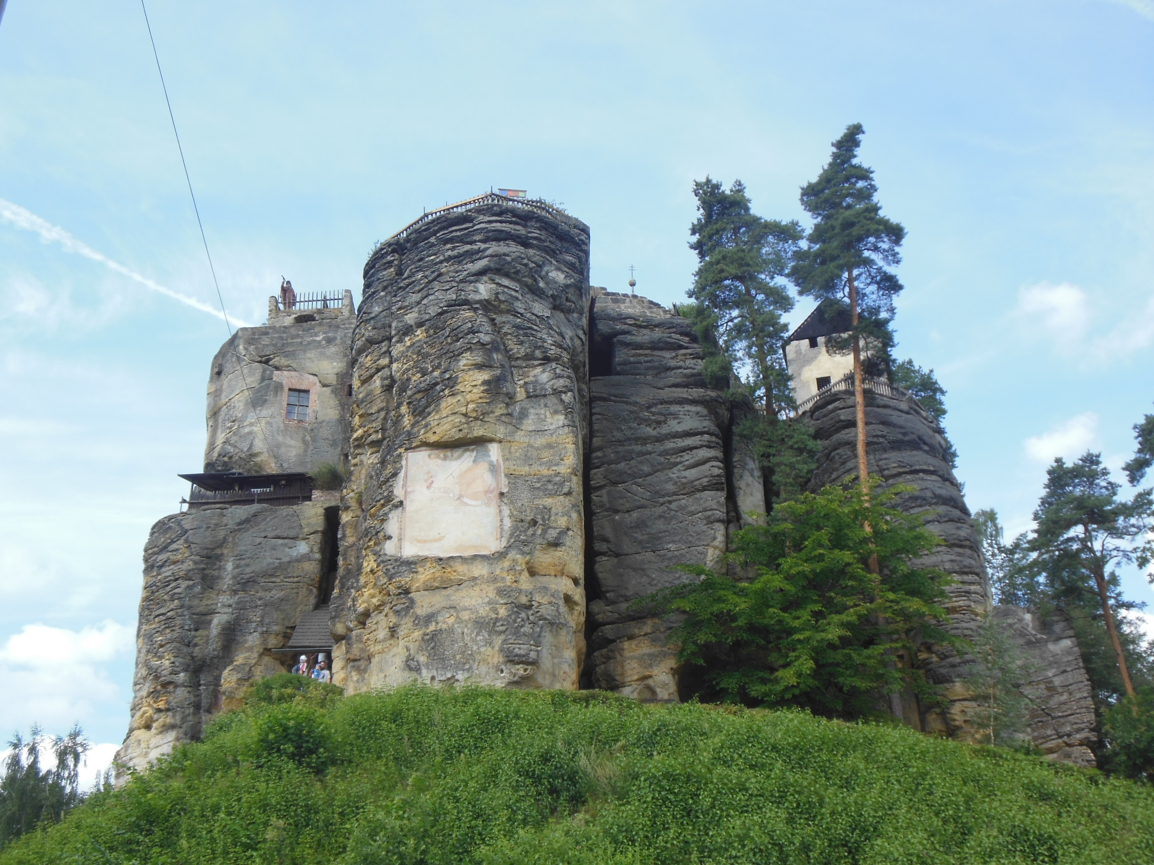 Sloup v Čechách (okres Česká Lípa). Skalní hrad, pohled z ulice Mikovcova.